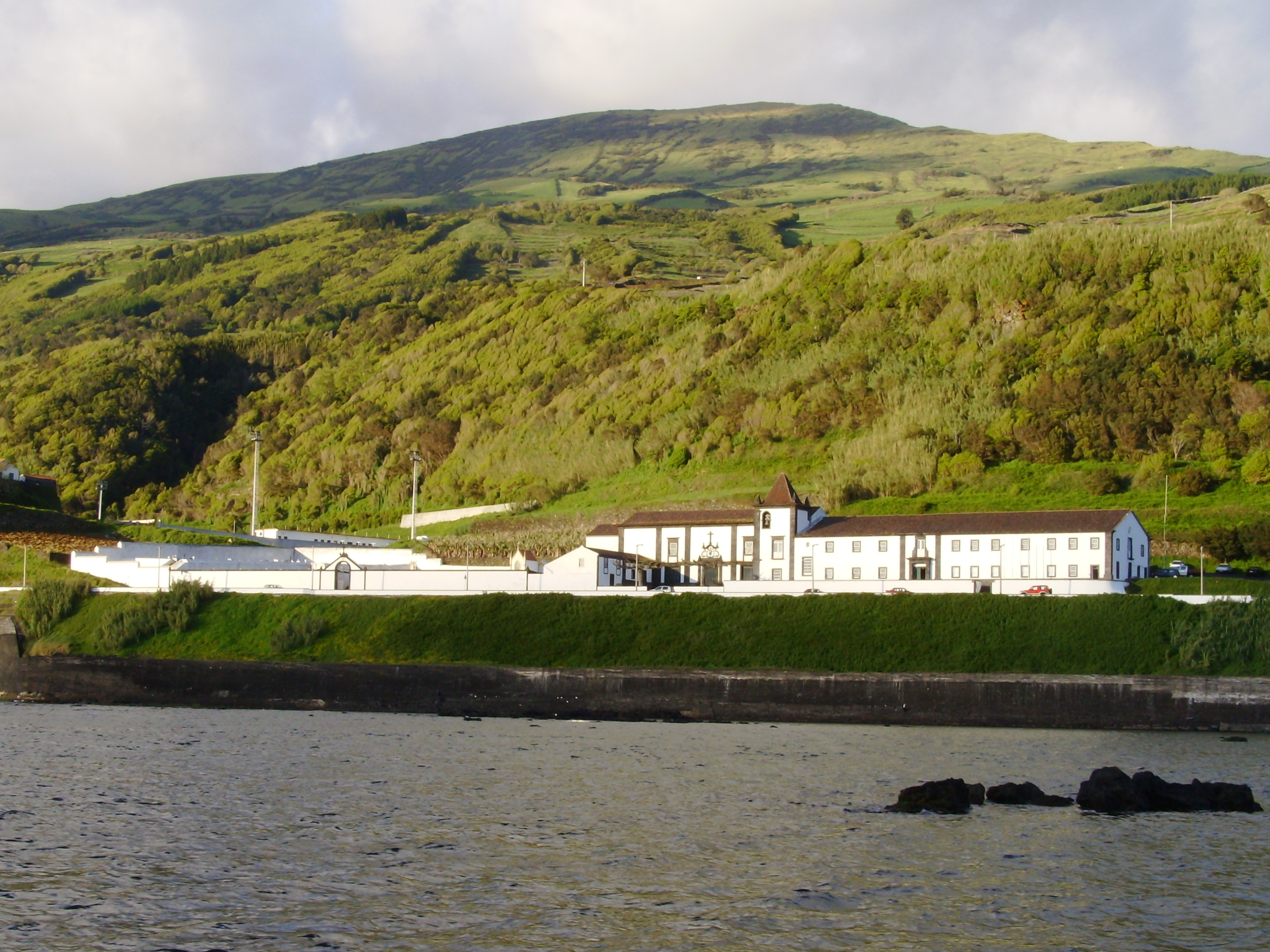 Convento dos Franciscanos e Igreja de Nossa Senhora da Conceição, freguesia e concelho de Lajes do Pico, ilha do Pico, Açores: visto do mar.